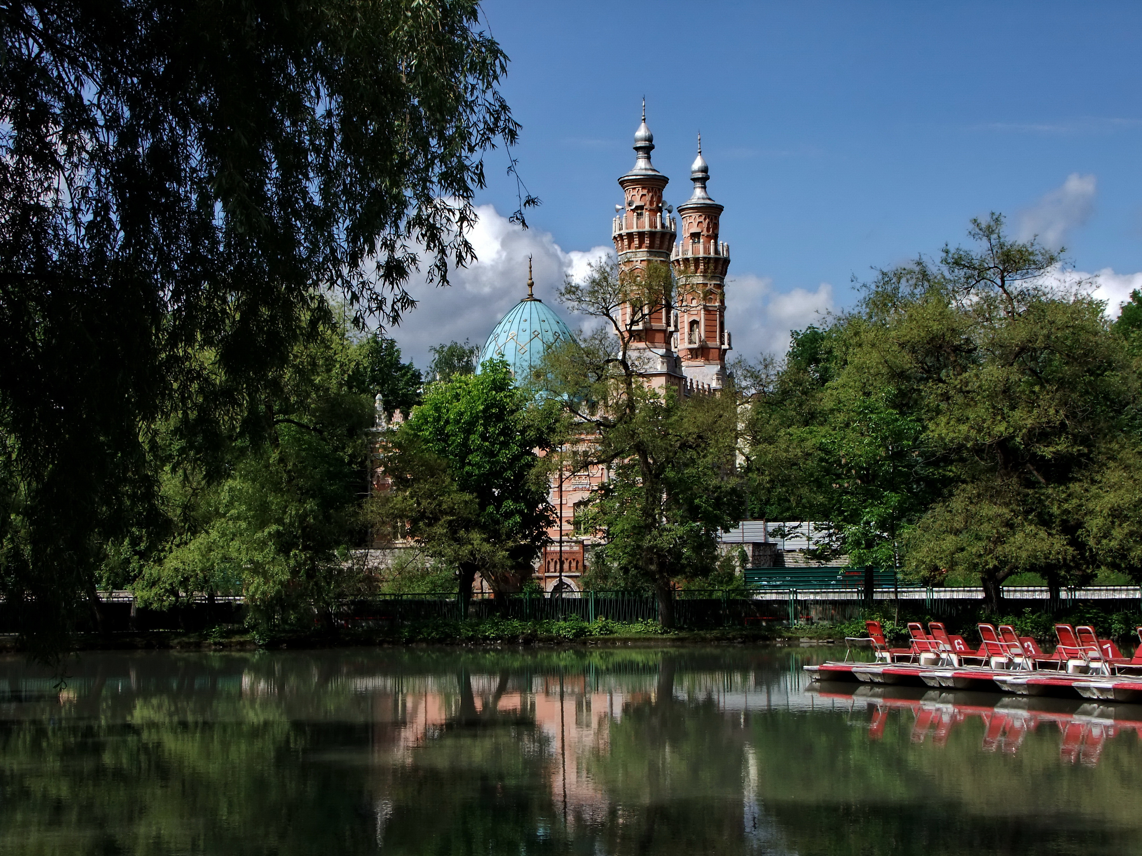 Владикавказ. Вид на суннитскую мечеть (Мечеть Мухтарова) из центрального парка культуры и отдыха. Ирон: Мухтаровы мæзджыты уынд Дзæуджыхъæуы централон паркæй.